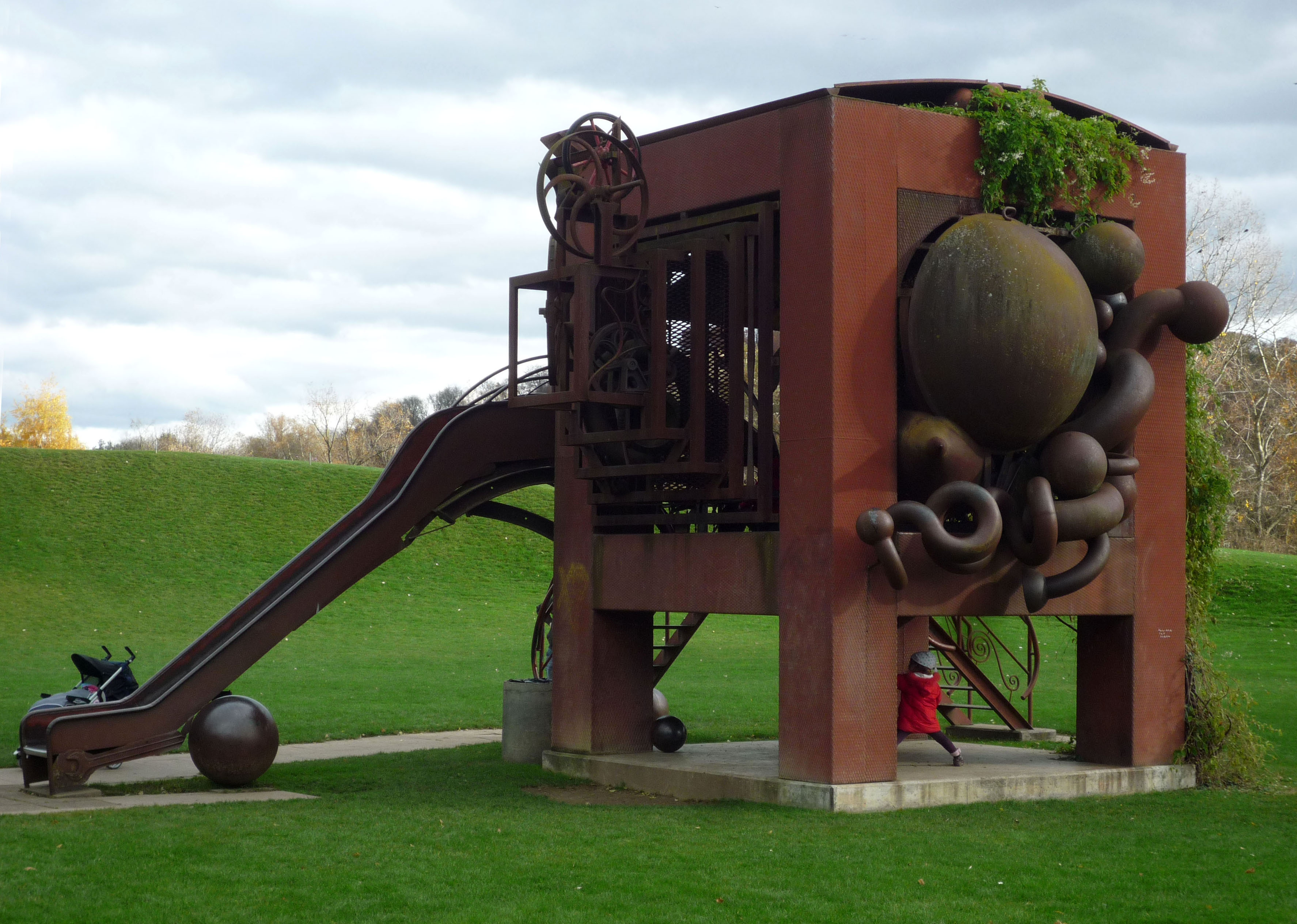 Sculpture "Amboss" by Bernhard Luginbühl in Muttenz/Switzerland